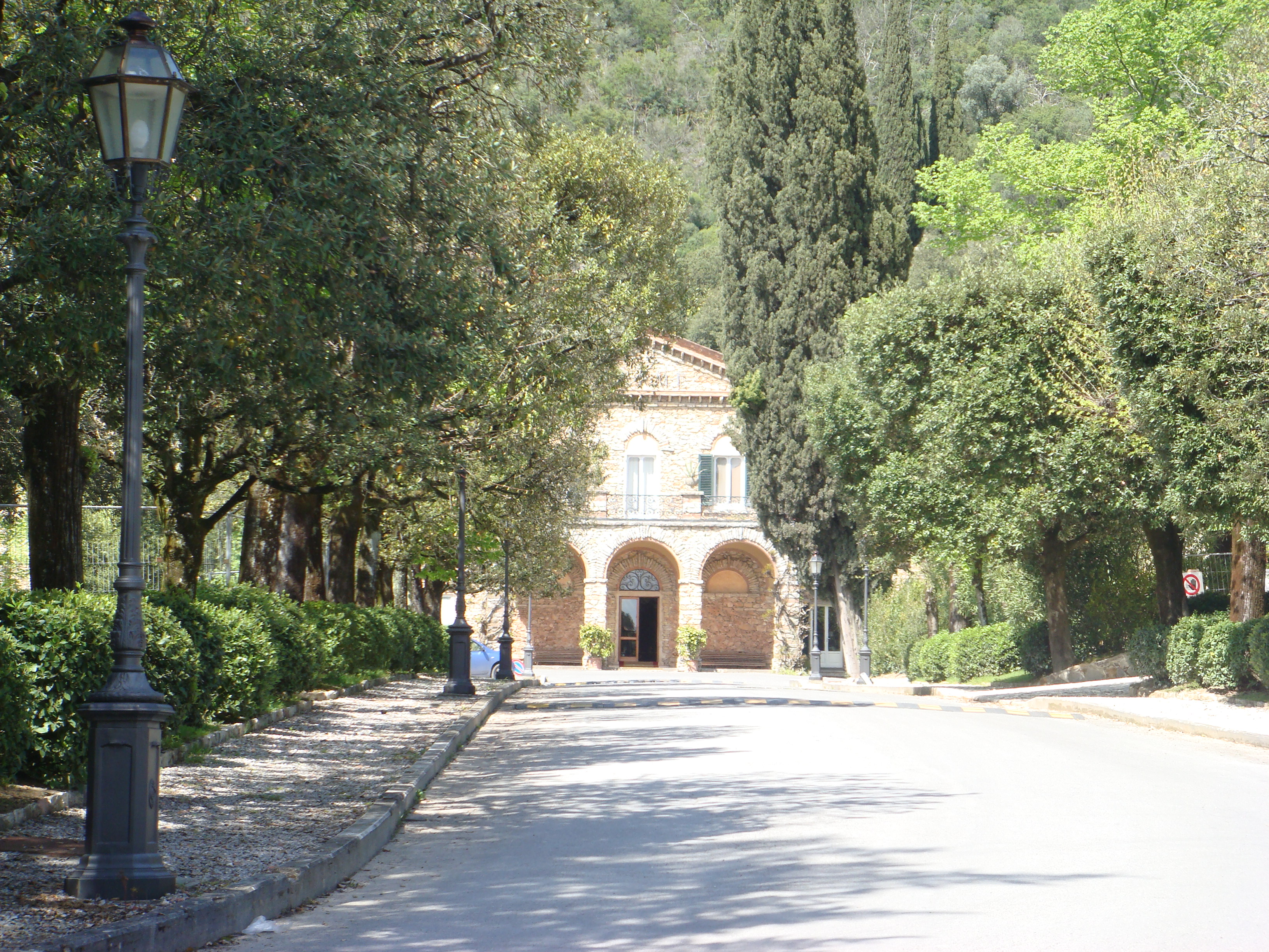 L'ingresso delle terme Grotta Giusti a Monsummano Terme (Provincia di Pistoia, Italia)